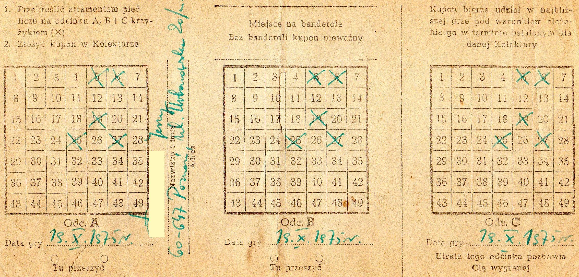 Poznańska Gra Liczbowa Koziołki - kupon z 19.10.1975r.